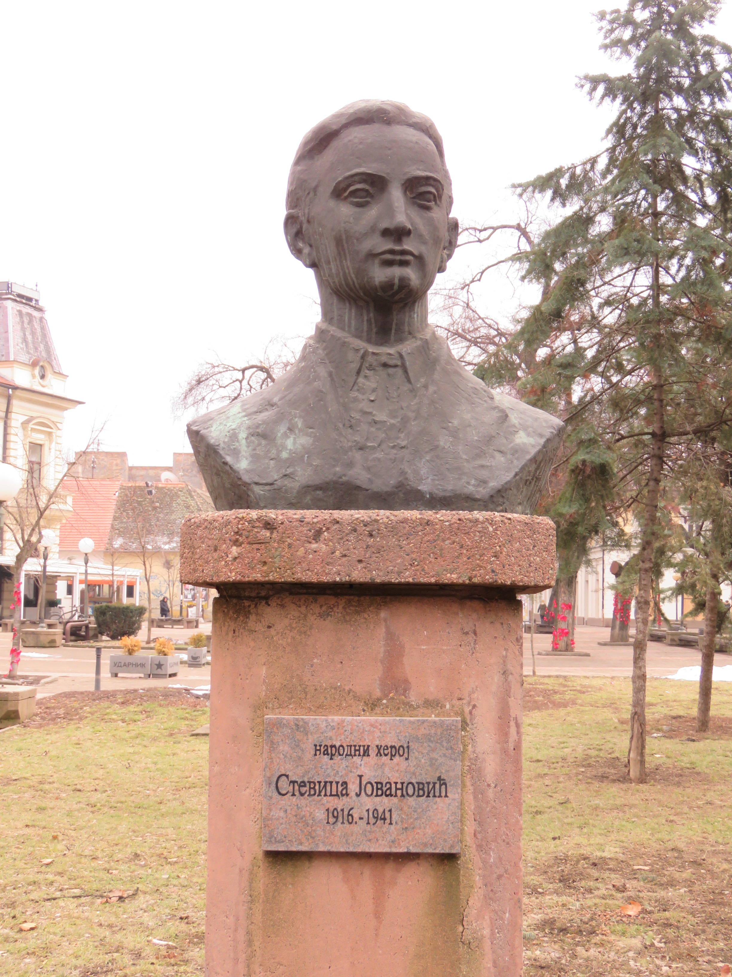 Stevica Jovanović, Narodni heroj SFRJ. Bista u Pančevu.